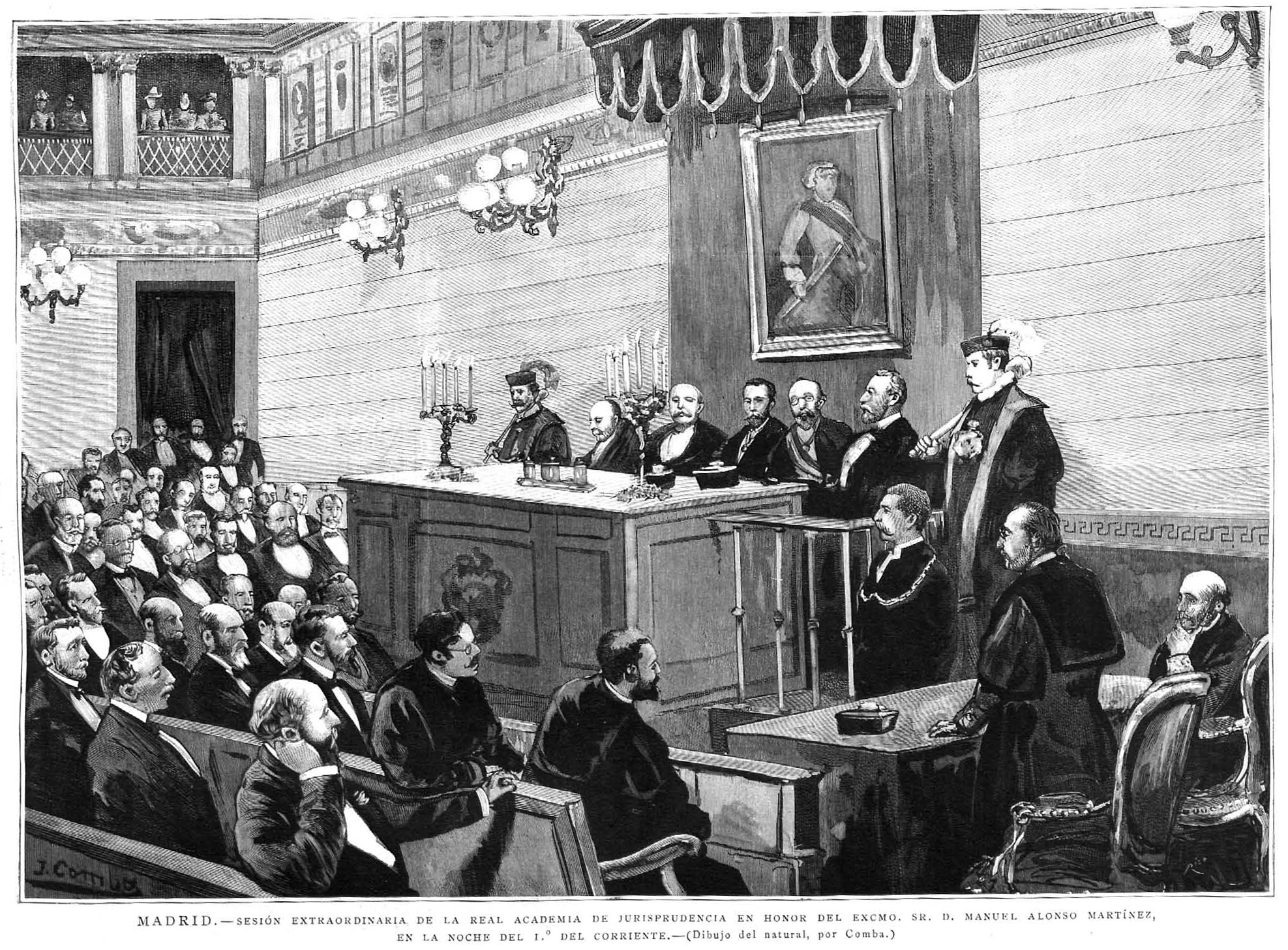 Madrid, sesión extraordinaria de la Real Academia de Jurisprudencia en honor del Excmo. Sr. D. Manuel Alonso Martínez, en la noche del 1º del corriente (dibujo del natural, por Comba), en la revista española La Ilustración Española y Americana.